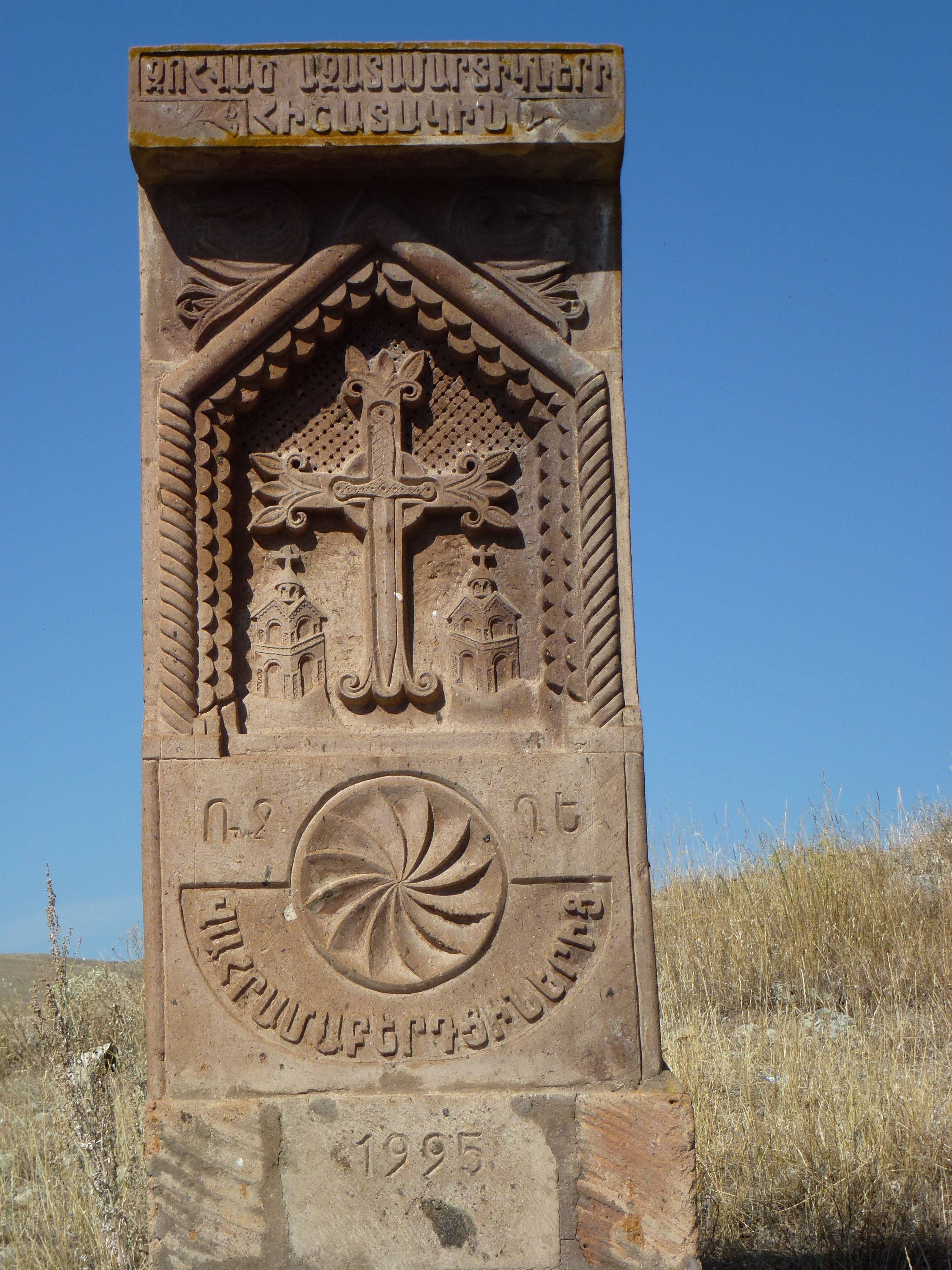 Խաչքար Մարմաշենի վանական համալիրում 108/10